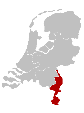 Grenzen der niederländischen Bistümer, Roermond hervorgehoben